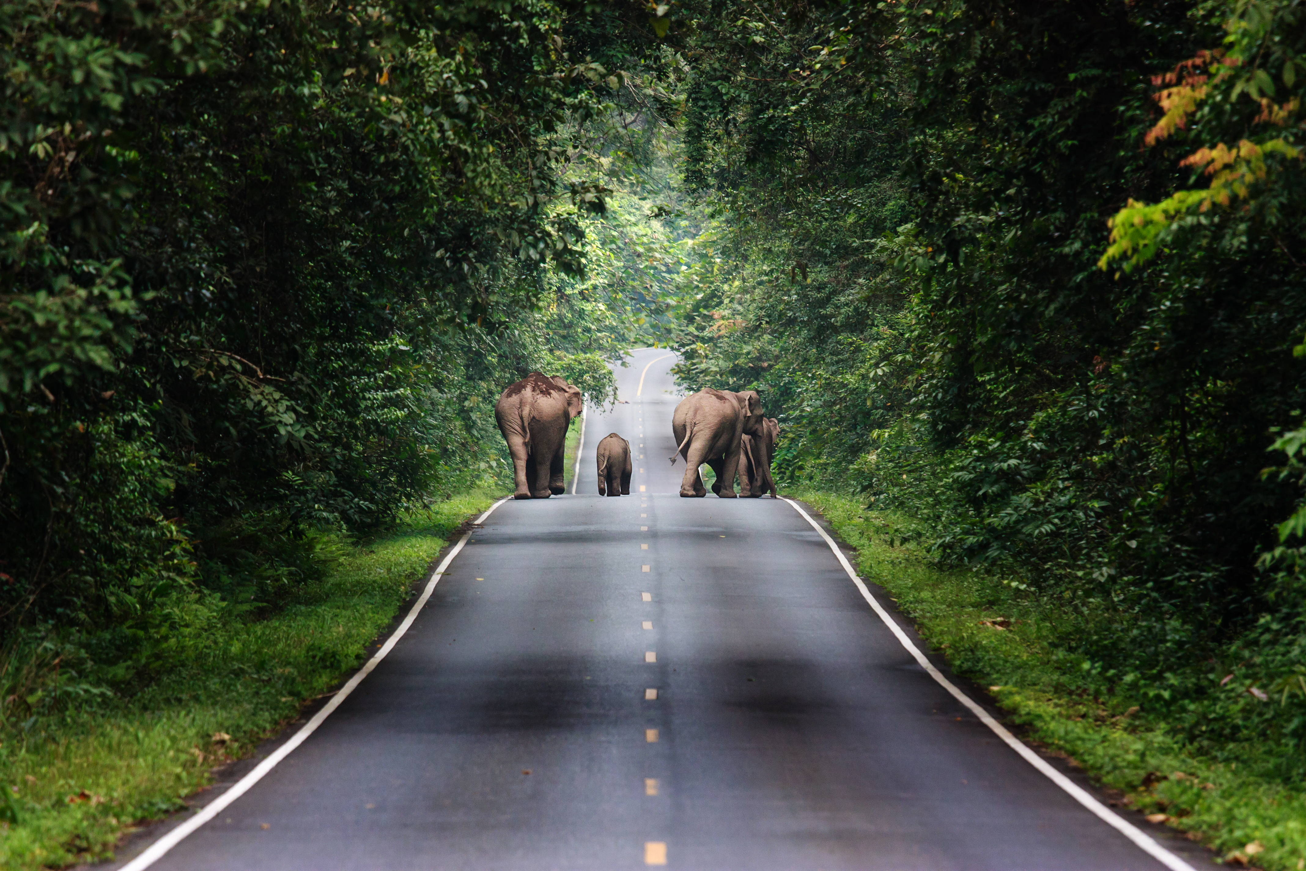 อุทยานแห่งชาติเขาใหญ่